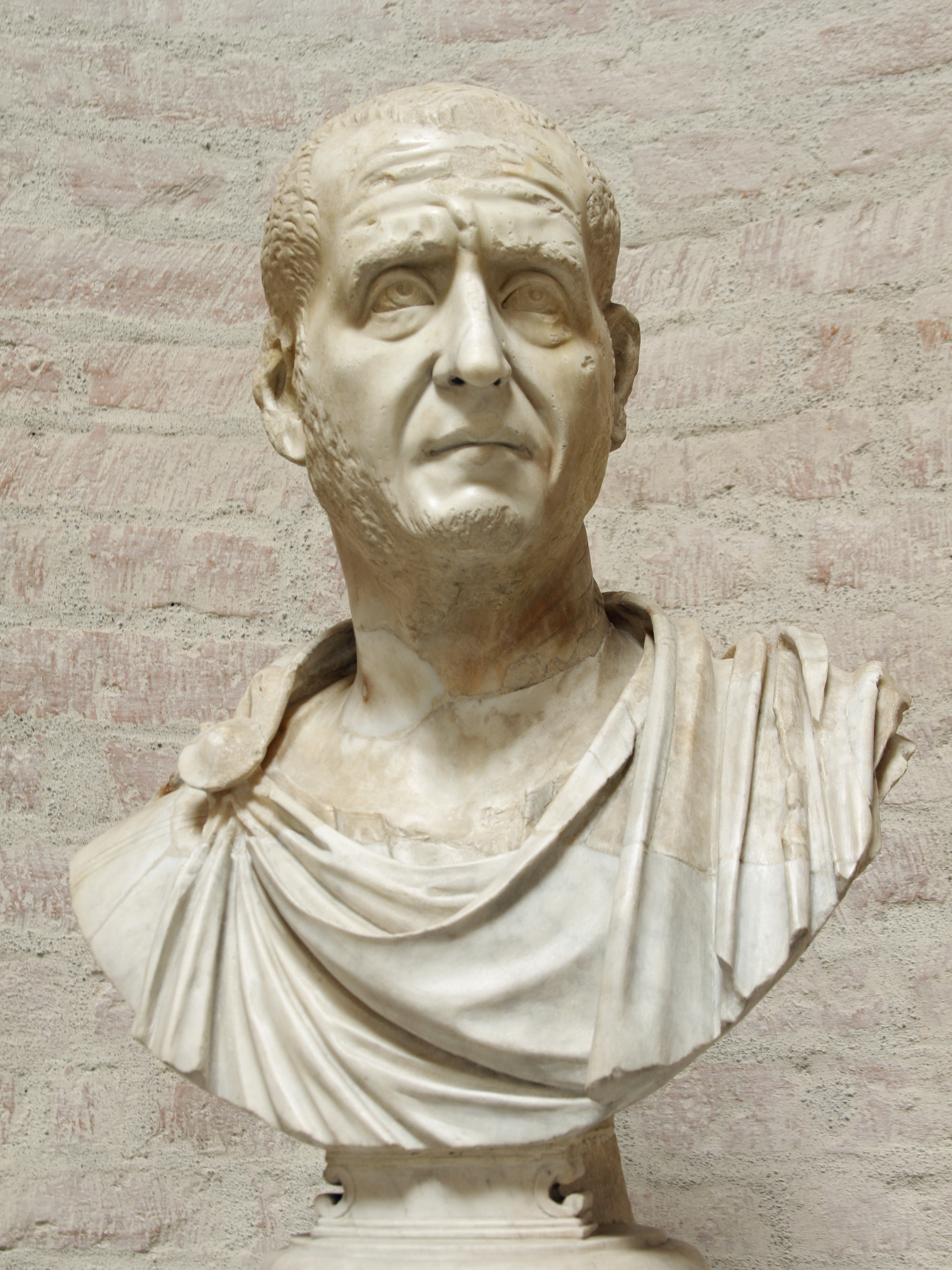 Glyptothek - Munich - Germany